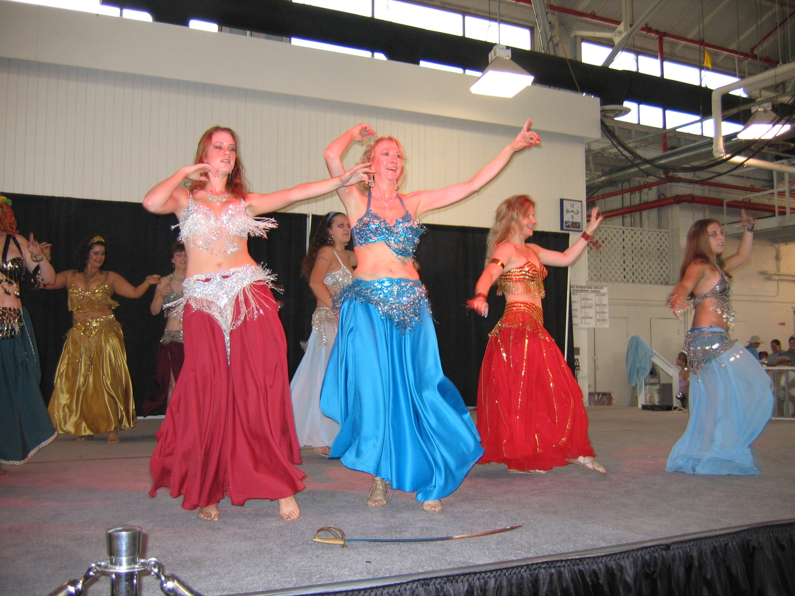 Vatsatanssiesitys.Desert Rhythms